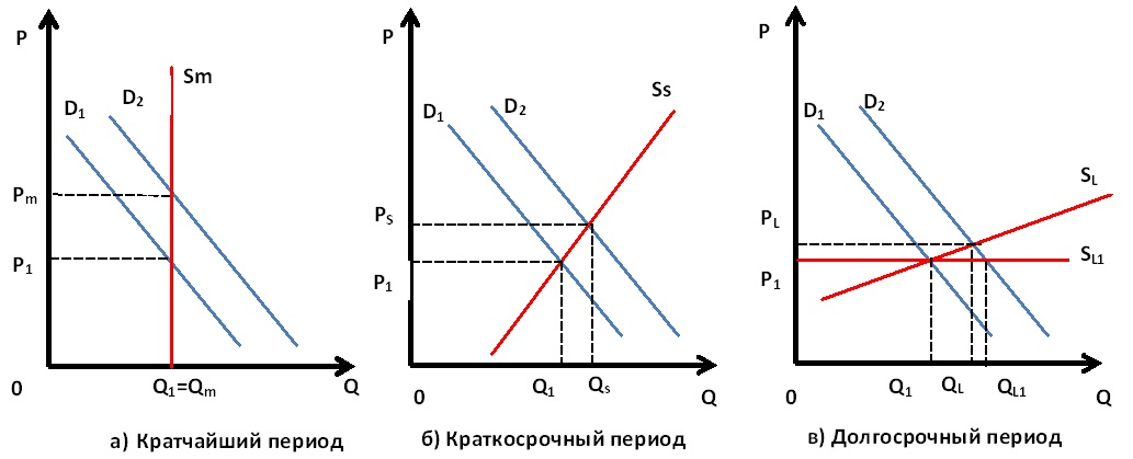 Фактор времени и эластичность предложения (Макконнелл К.Р., Брю С.Л. Экономикс: Принципы, проблемы и политика. В 2 т.. — М.: Республика, 1992. — Т. 2. — С. 22. — 400 с. — ISBN 5-250-01486-0)